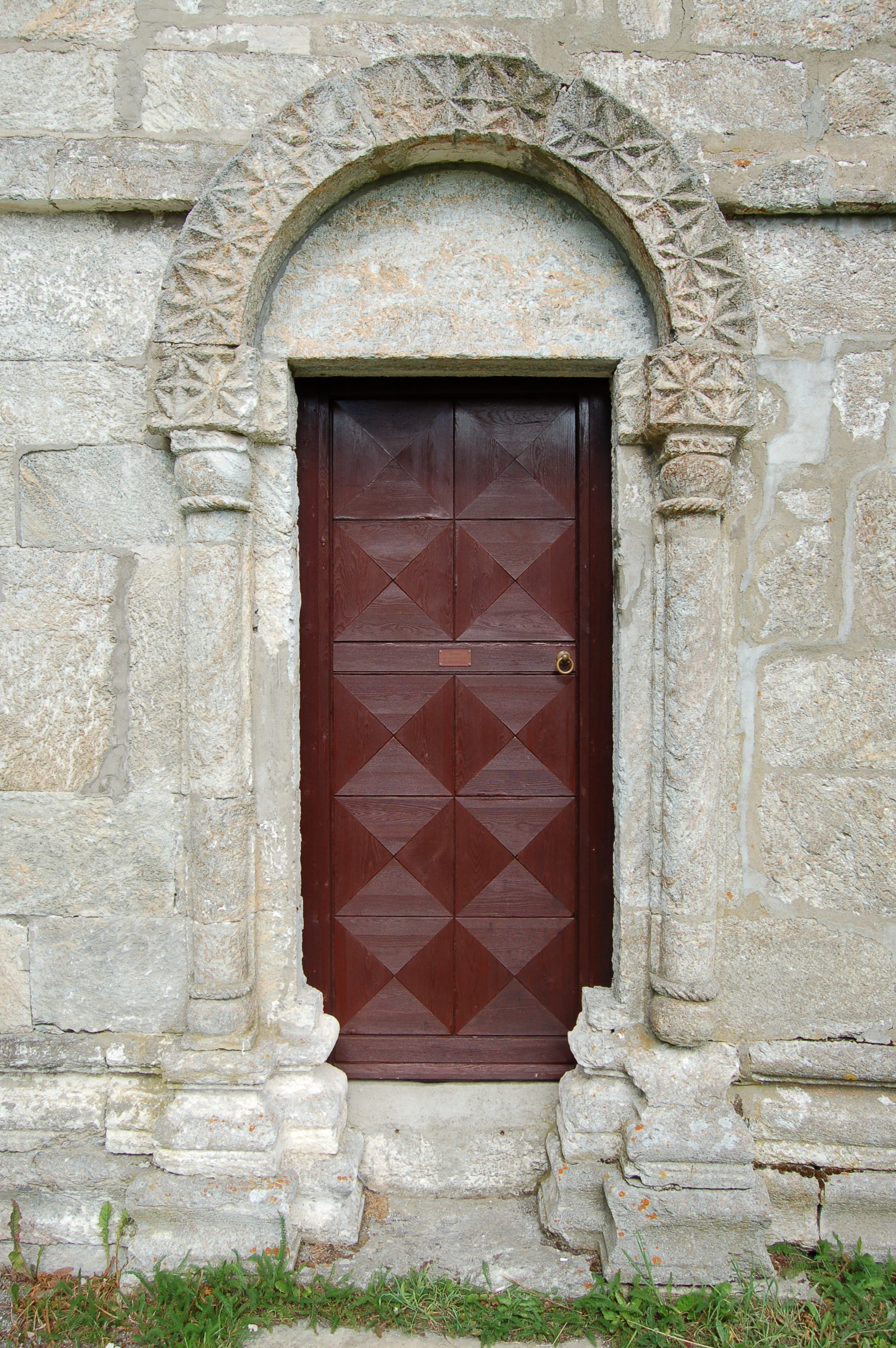 Portal fra Middelalderen, Alstahaug kirke i Nordland